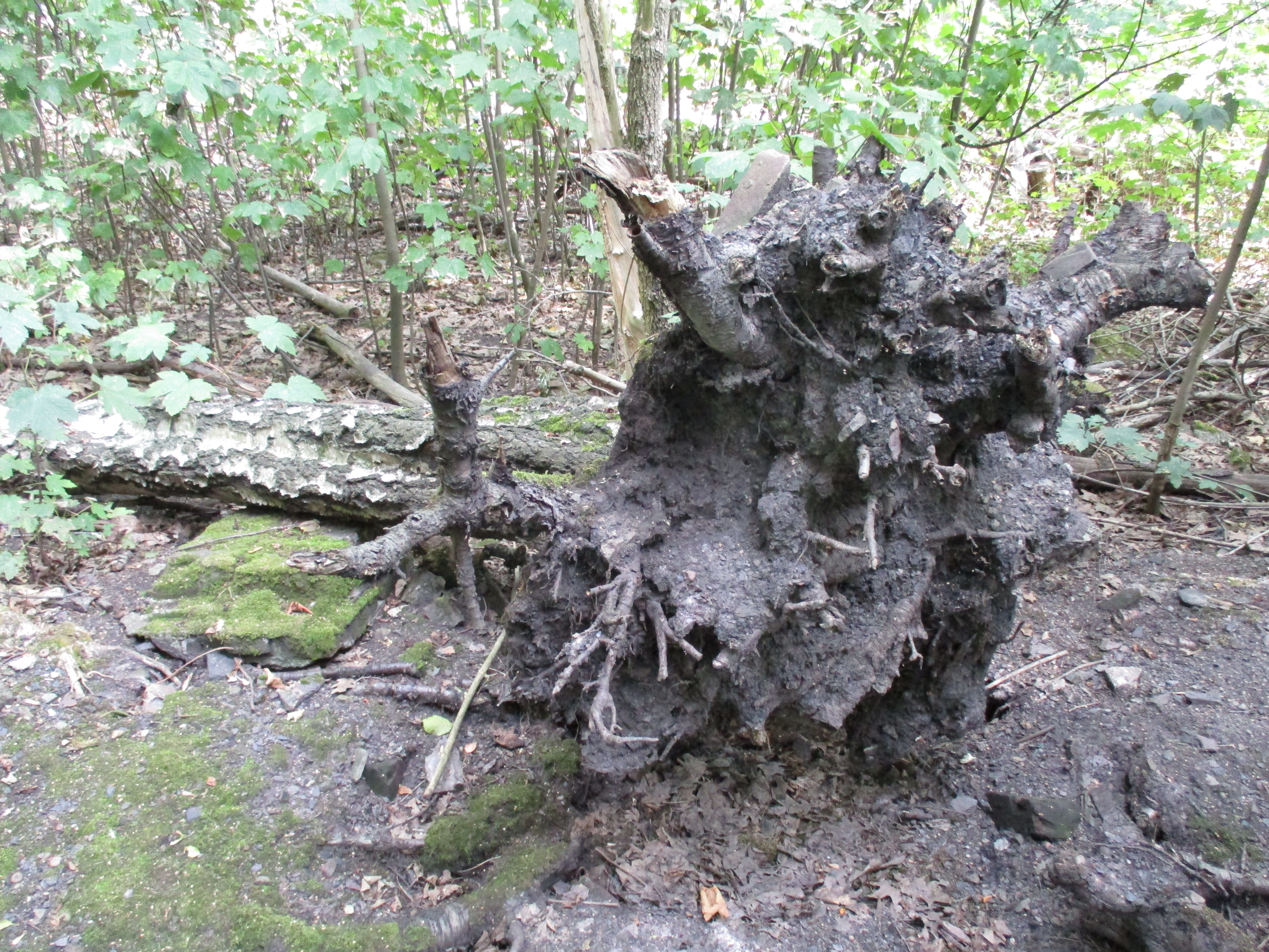 Panzerbau III war eine Rüstungsschmiede der Firma Krupp während dem 2. Weltkrieg in Essen-Borbeck. Dort wurden Zulieferteile für den Tigerpanzer gefertigt. Heute befindet sich auf der Fläche ein kleines Naherholungsgebiet. Hier und da entdeckt man heute noch Fundamentreste der ehemaligen Panzerfabrik.